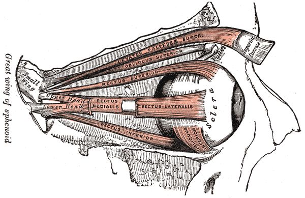 External eye muscles